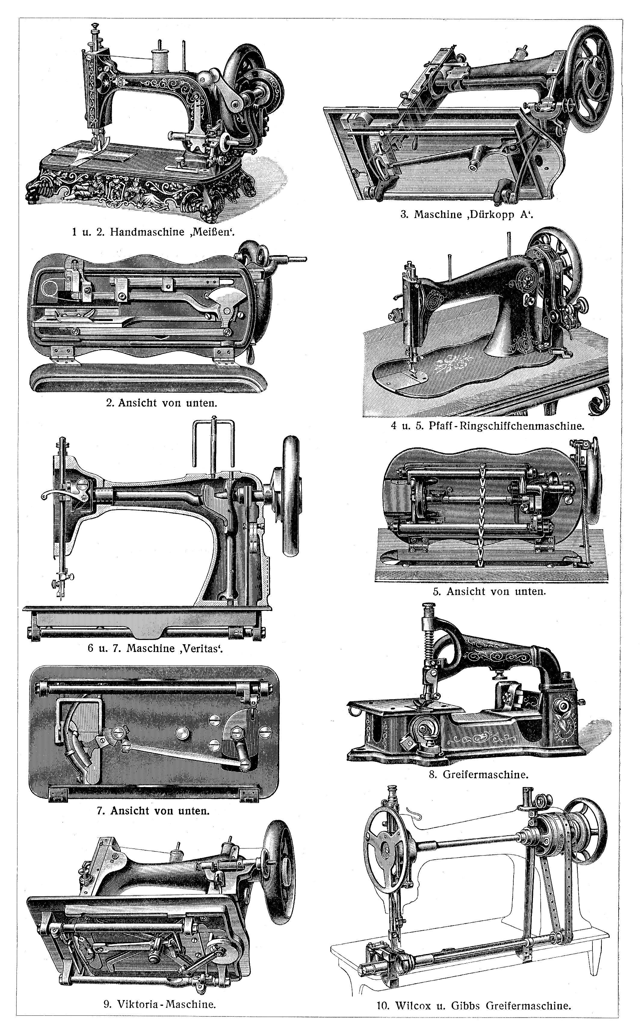 Verschiedenen Nähmaschinenmodelle, Tafel 1 (Beschreibung siehe Artikel)